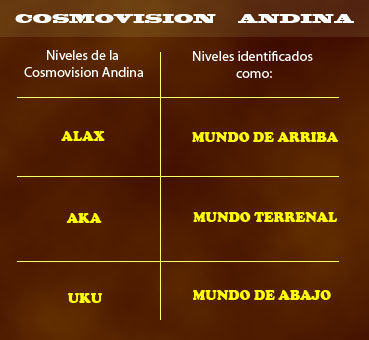 Esquema que explica los niveles de la cosmovision andina.